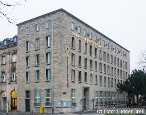 Literaturhaus Darmstadt Außenansicht Foto Ludger Breil klein